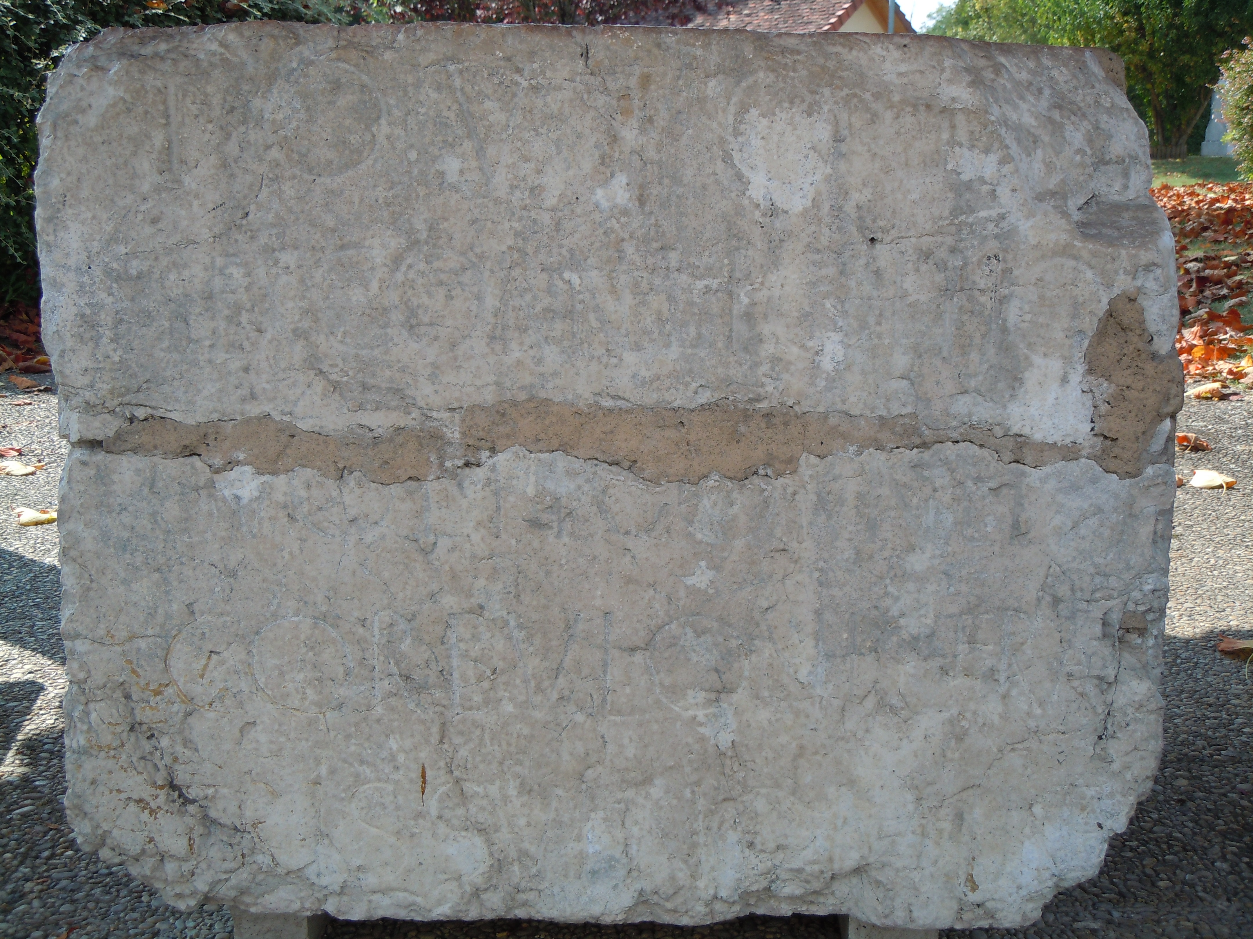 Pierre de Corbulon - Belmont-Tramonet - Savoie - France. Iovi O(ptimo) M(aximo) / Sex(tus) Cornel(ius) Pollio / suo et L(uci) Corneli / Corbulonis fra/tris sui nomine. CIL XII 2414 = ILN-05-03, 00620 = CAG-73, p 125